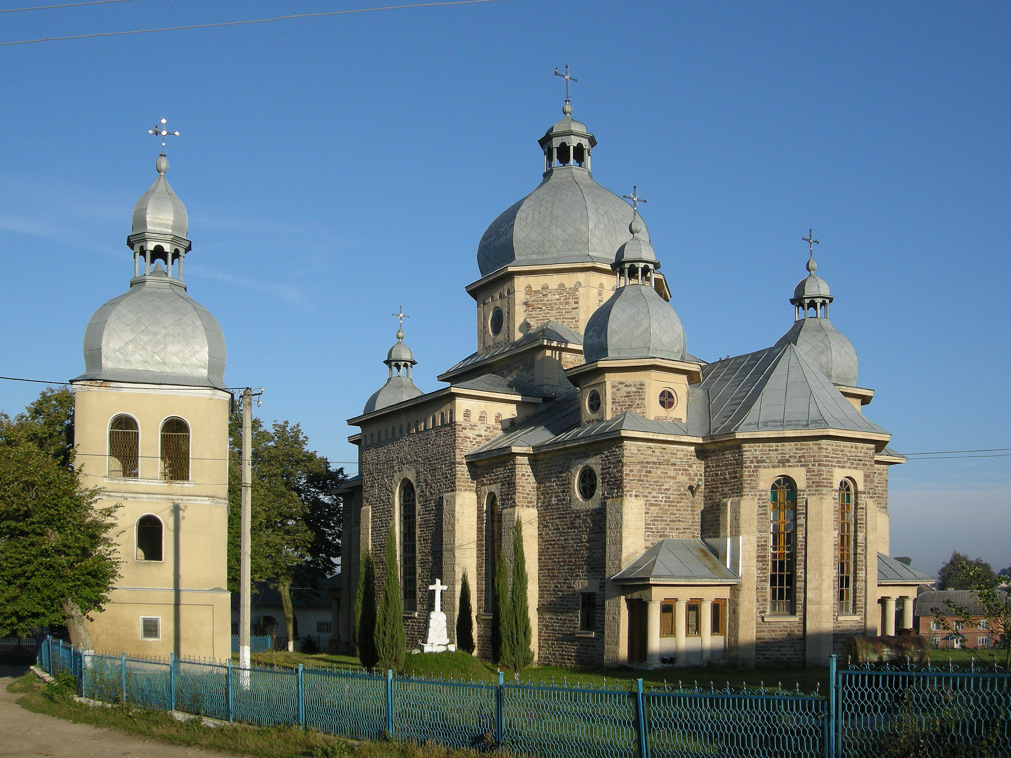 Церква Преподобної Параскеви УГКЦ в с. Трибухівці Бучацького району Тернопільської області.